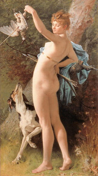 Charles-Alexandre Coëssin de la Fosse, Diane 1889 coll privée